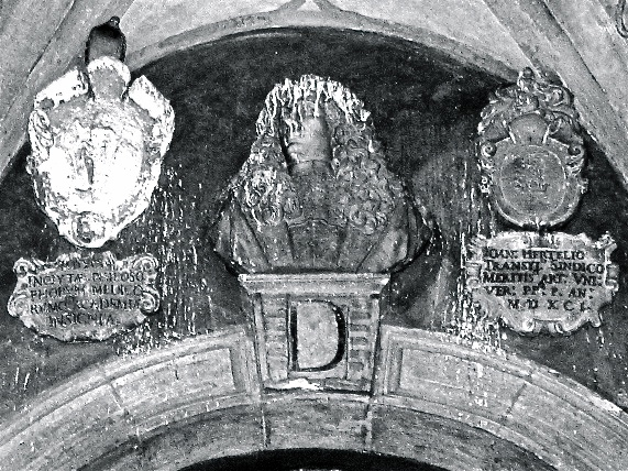 Büste (Basrelief) von Johannes Hertelius (1591) an der Universität Padua (Palazzo il Bo)